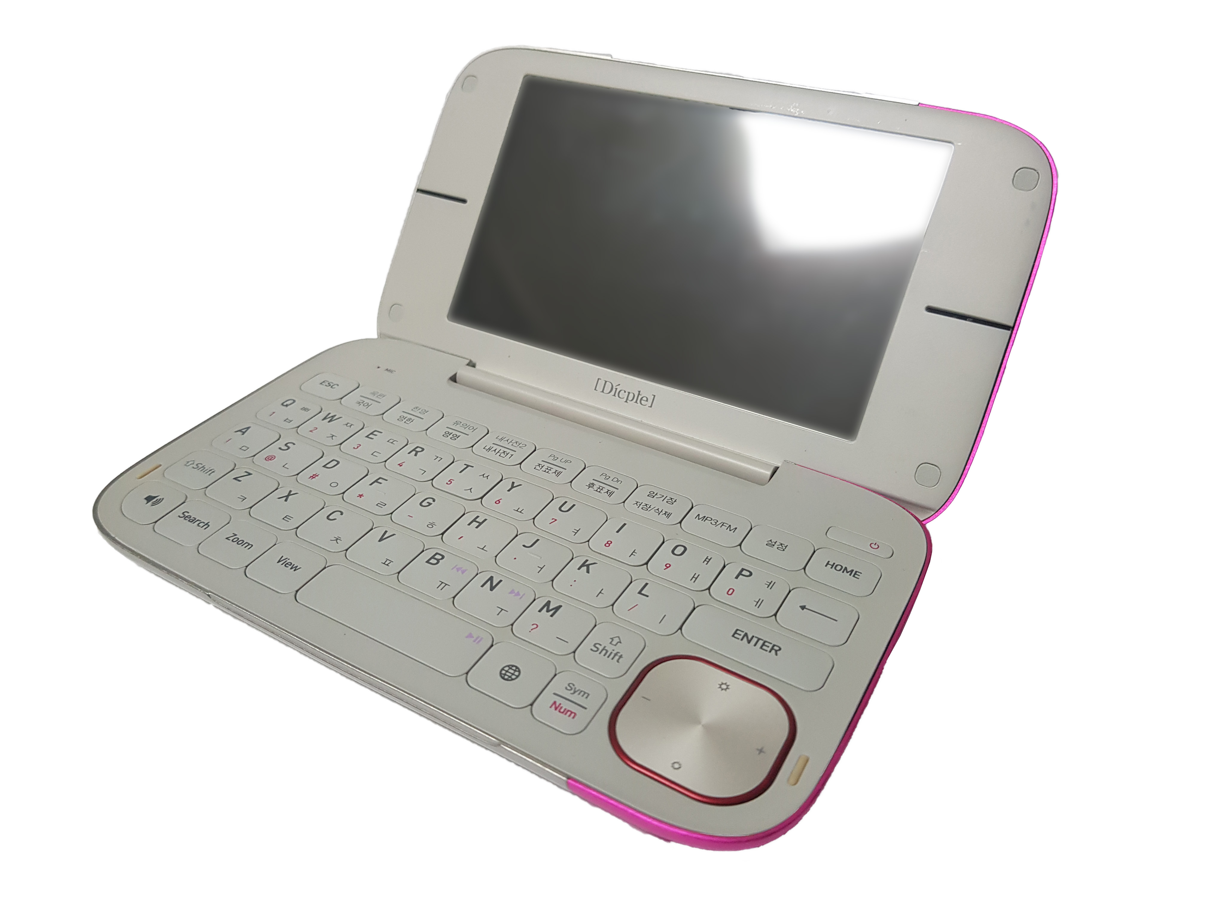 아이리버 딕플 D2000